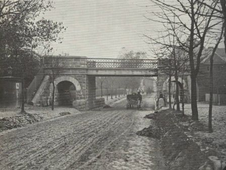 Spanien, set fra syd, mod Dynkarken, 1895